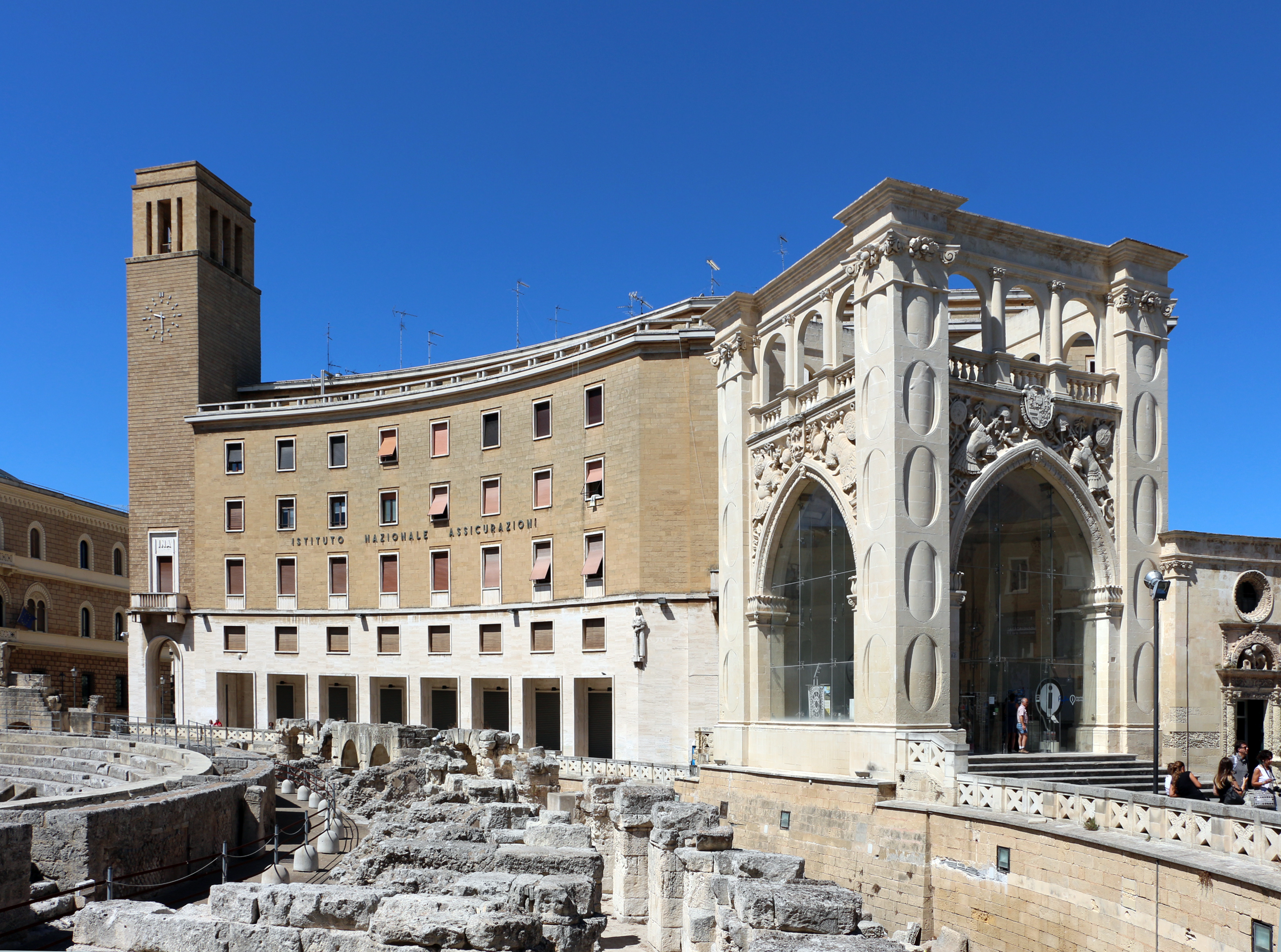 Sedile Veneziano This is a photo of a monument which is part of cultural heritage of Italy.